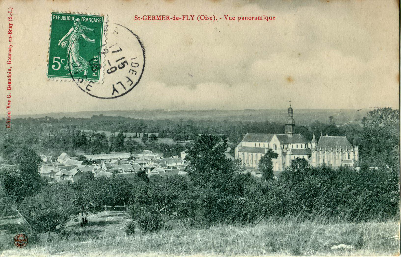 Carte postale ancienne éditée par la Veuve BeaudoinSaint-Germer-de-Fly : vue générale (à droite, l')Abbaye Saint-Germer-de-Fly